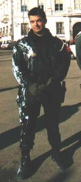 Bildbeschreibung: Durch Farbbeutel attackierter und beschmutzter Polizist Quelle: Homepage Fotograf/Zeichner: Betreiber der o.a. Homepage Datum: 04.02.2000 Sonstiges: Das Foto stellt den Betreiber der o.a. Homepage dar, welcher dieses Foto auch auf seiner Homepage veröffentlich hat und auch mit der Veröffentlichung in der Wikipedia ausdrücklich einverstanden ist.